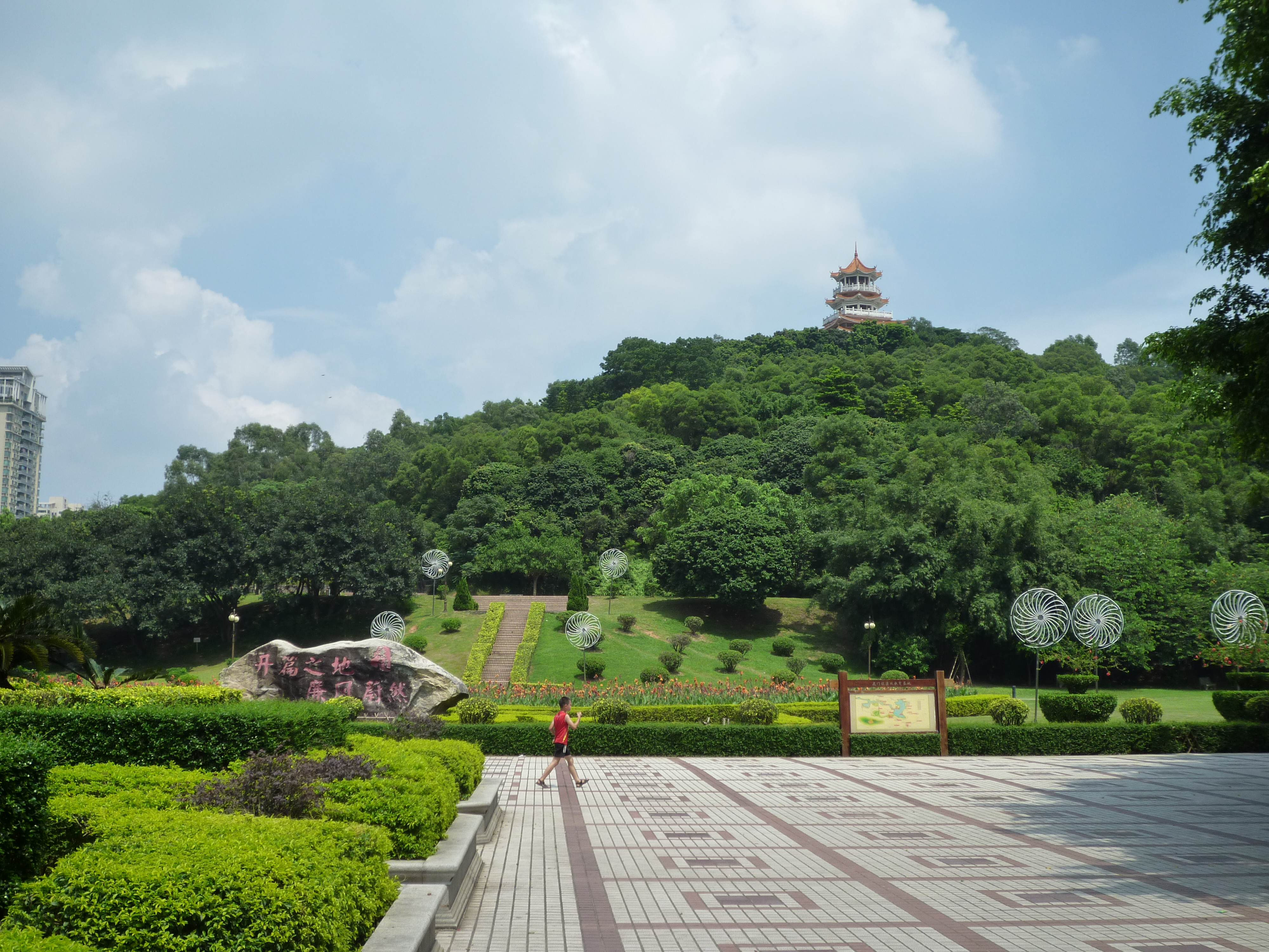 虎門山